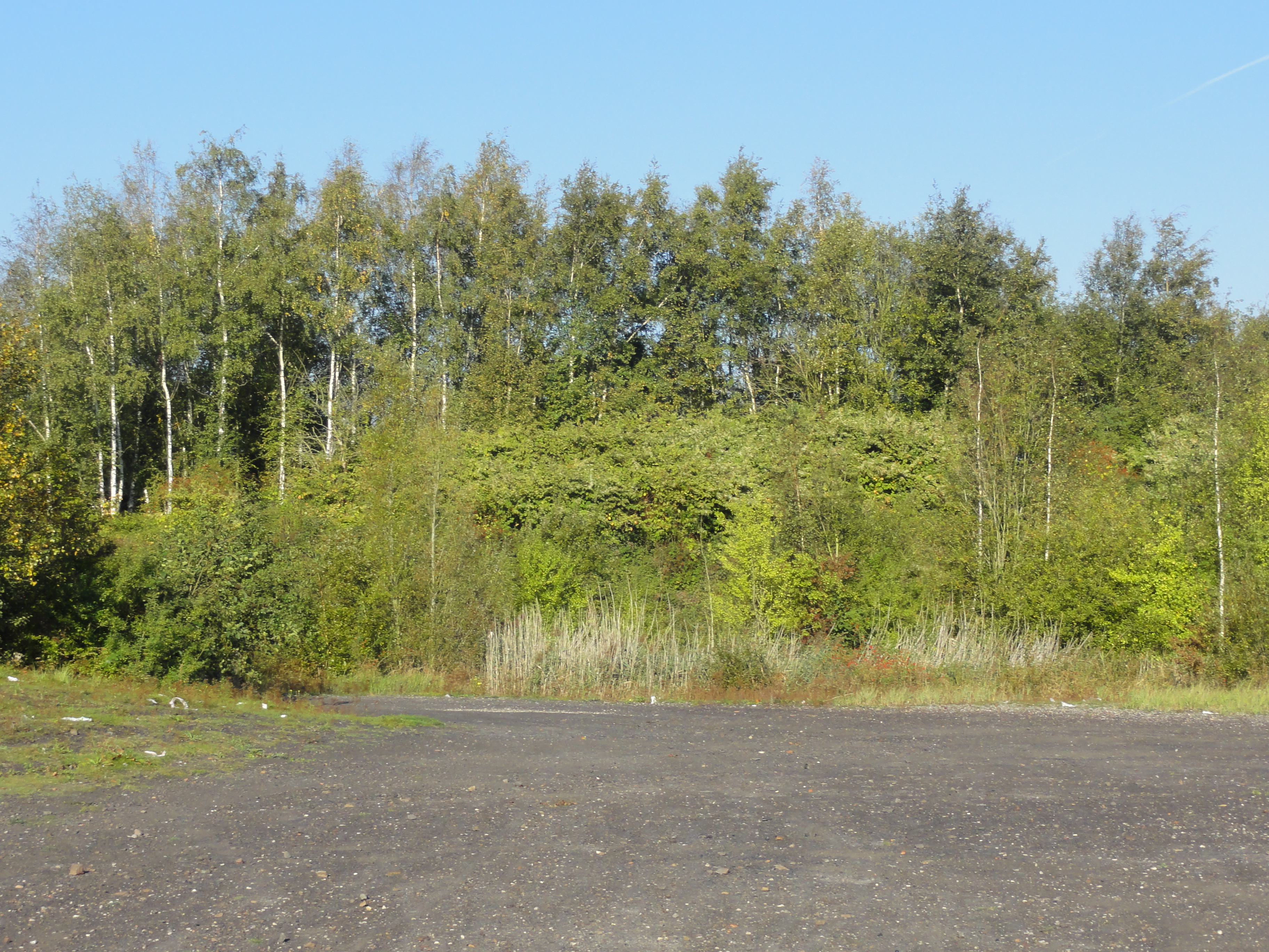 Terril n° 120 dit 6 d'Oignies Nord, Fosse n° 6 de la Compagnie des mines d'Ostricourt, Ostricourt, Nord, Nord-Pas-de-Calais, France.